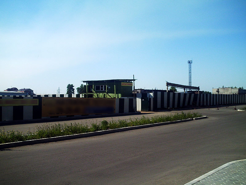 Территория будущей застройки объектов "Иркутск-сити"